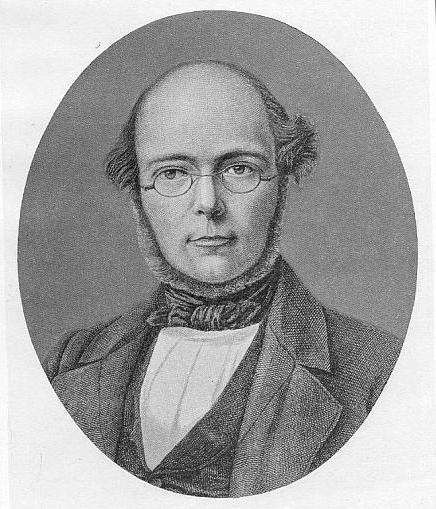 Theodor Bergk (1812–1881), deutscher klassischer Philologe. Stich von Adolf Neumann